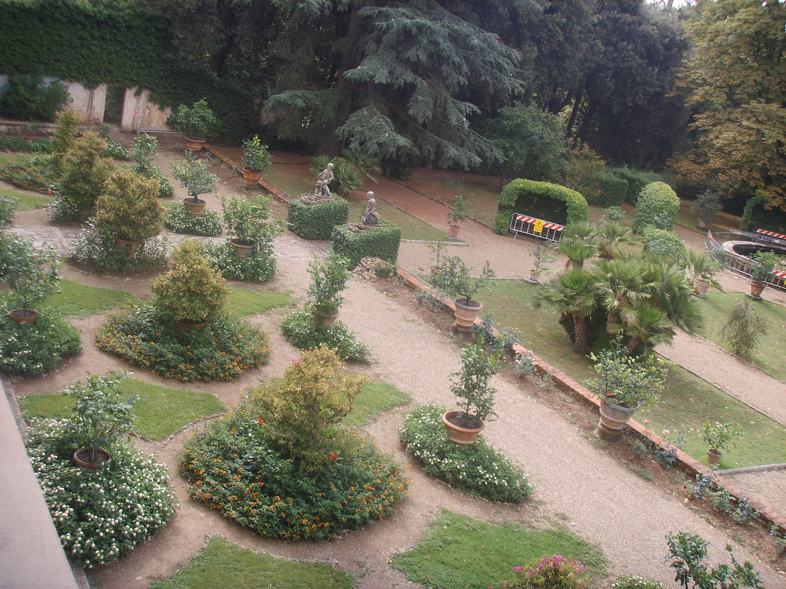 Villa di Careggi in Florence, Italy